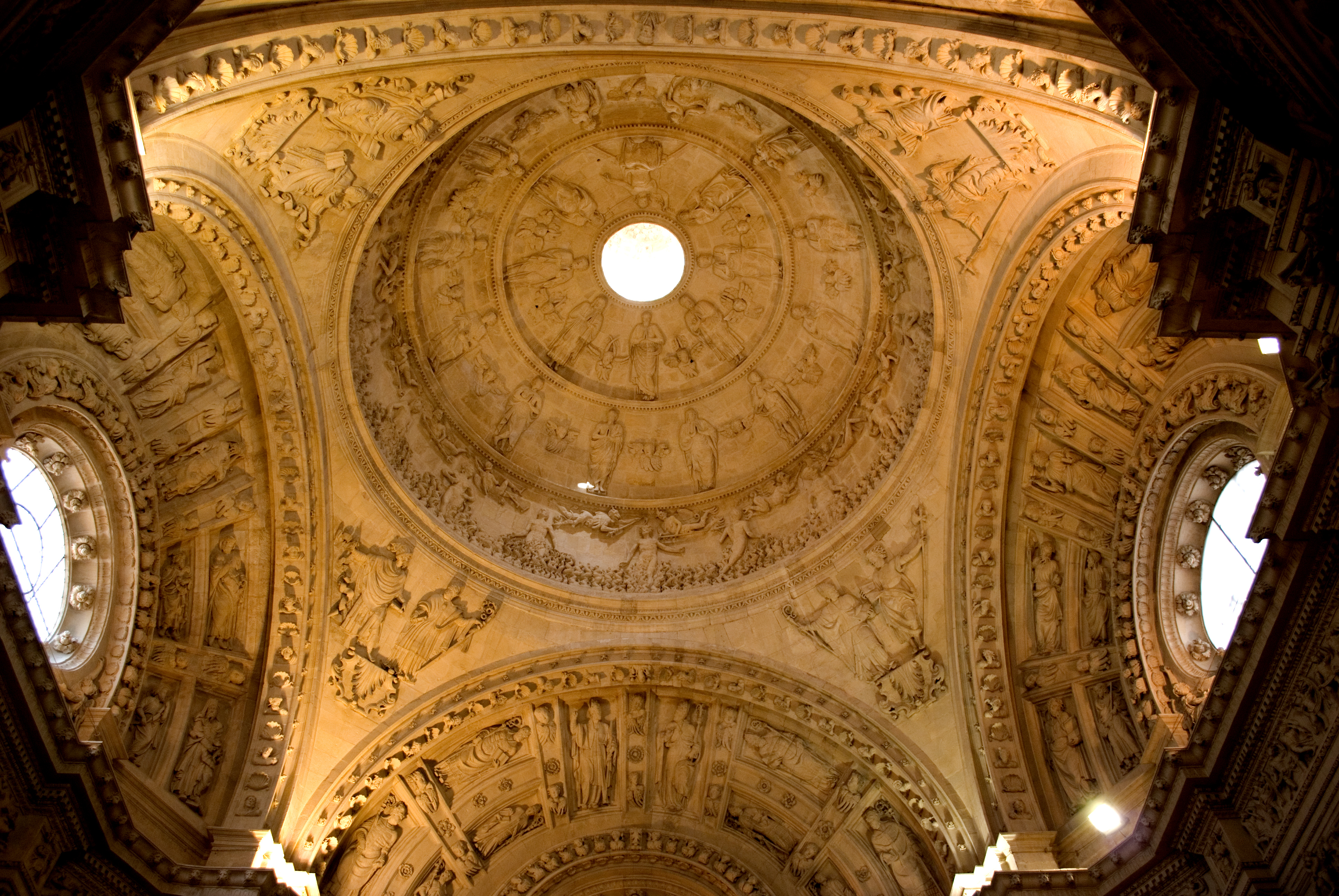 Cúpula de la sacristía mayor de la catedral de Sevilla